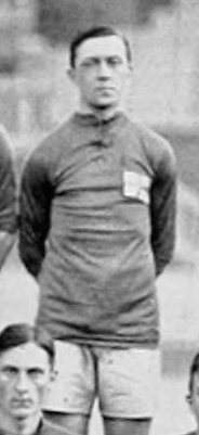 Erik Bergström at the 1912 Olympics